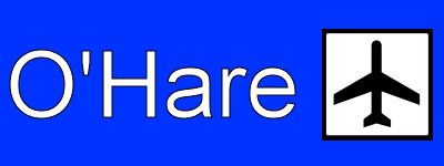 O'Hare destination sign.